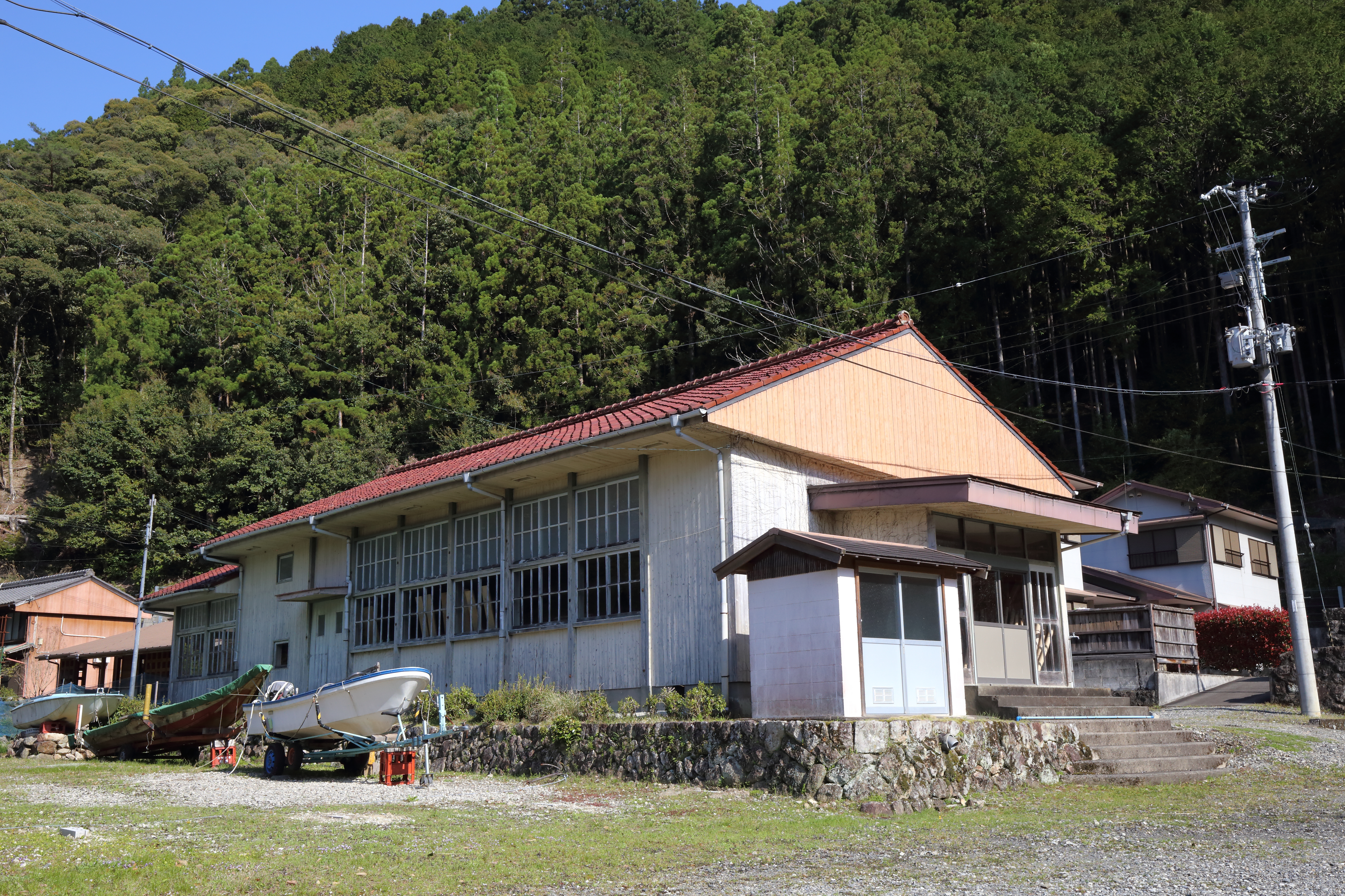 九重小学校 講堂 和歌山県新宮市熊野川町九重 ※Bookcafe kuju（旧九重小学校-教室）付近の住民に聞いたら【講堂】と言っておられました。